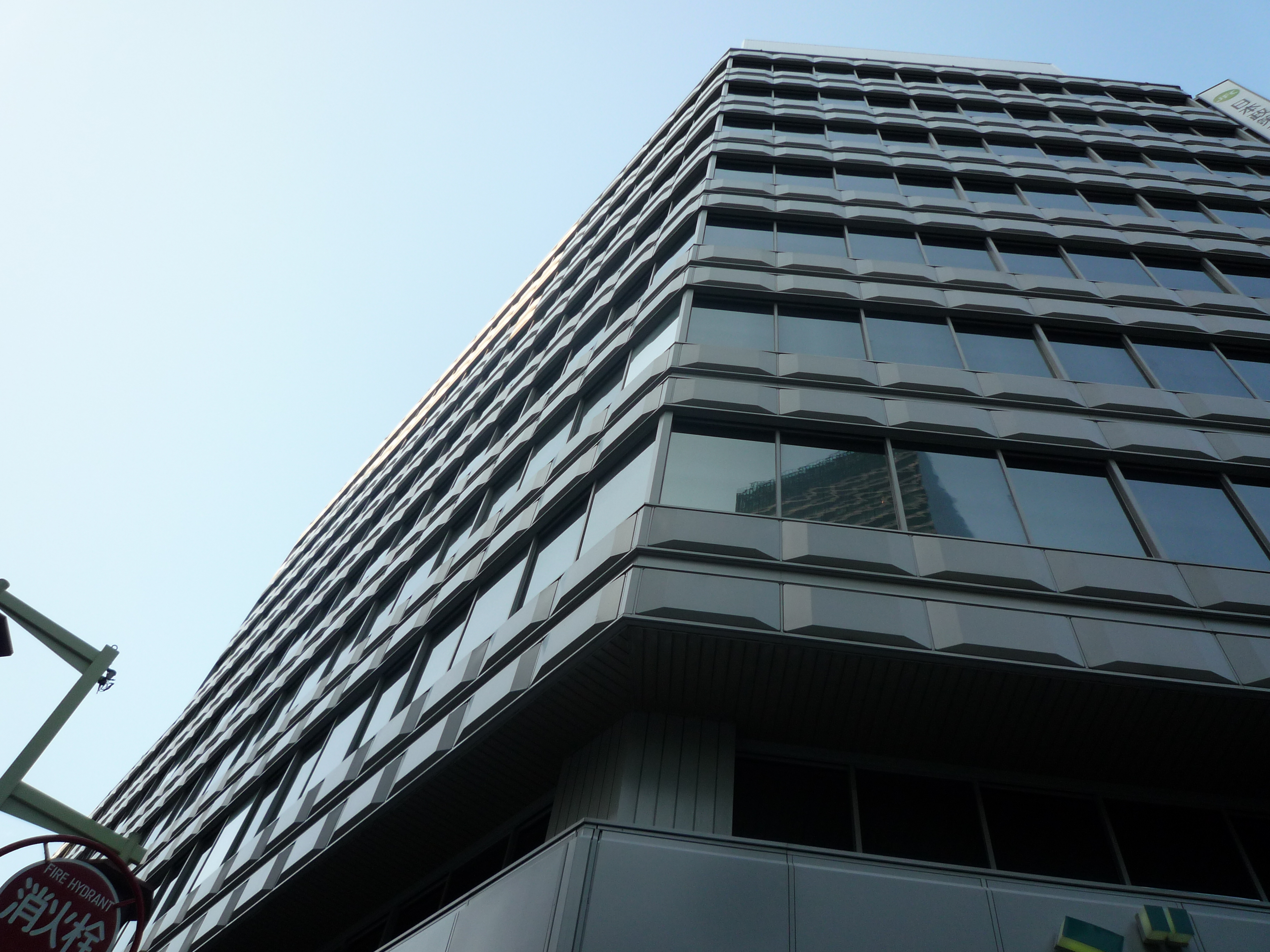 名古屋駅前の第一堀内ビルを撮影したものです。